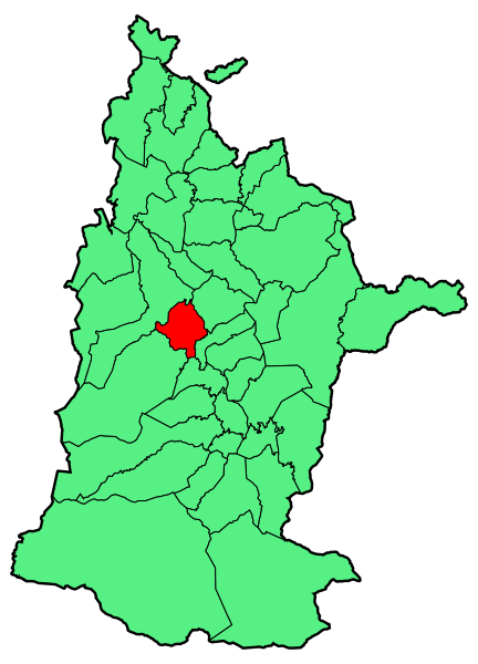 Aipaturiko udalerriaren kokapena Zuberoan